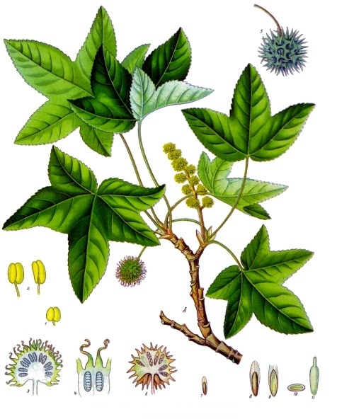 Storaxbaum. A blühender Zweig, natürl. Grösse; 1 u. 2 Staubgefässe, vergrössert; 3 weiblicher Blüfchenkopf im Längsschnitt, desgl.; 4 einzelne weibliche Blüthe, längsdurchschnitten, desgl.; 5 Fruchtkopf, desgl.; 6 derselbe im Längsschnitt, desgl.; 7 u. 8 Same mit Flügel, desgl.; 9 u. 10 derselbe im Längs- und Querschnitt, desgl.; 11 Embryo, desgl.